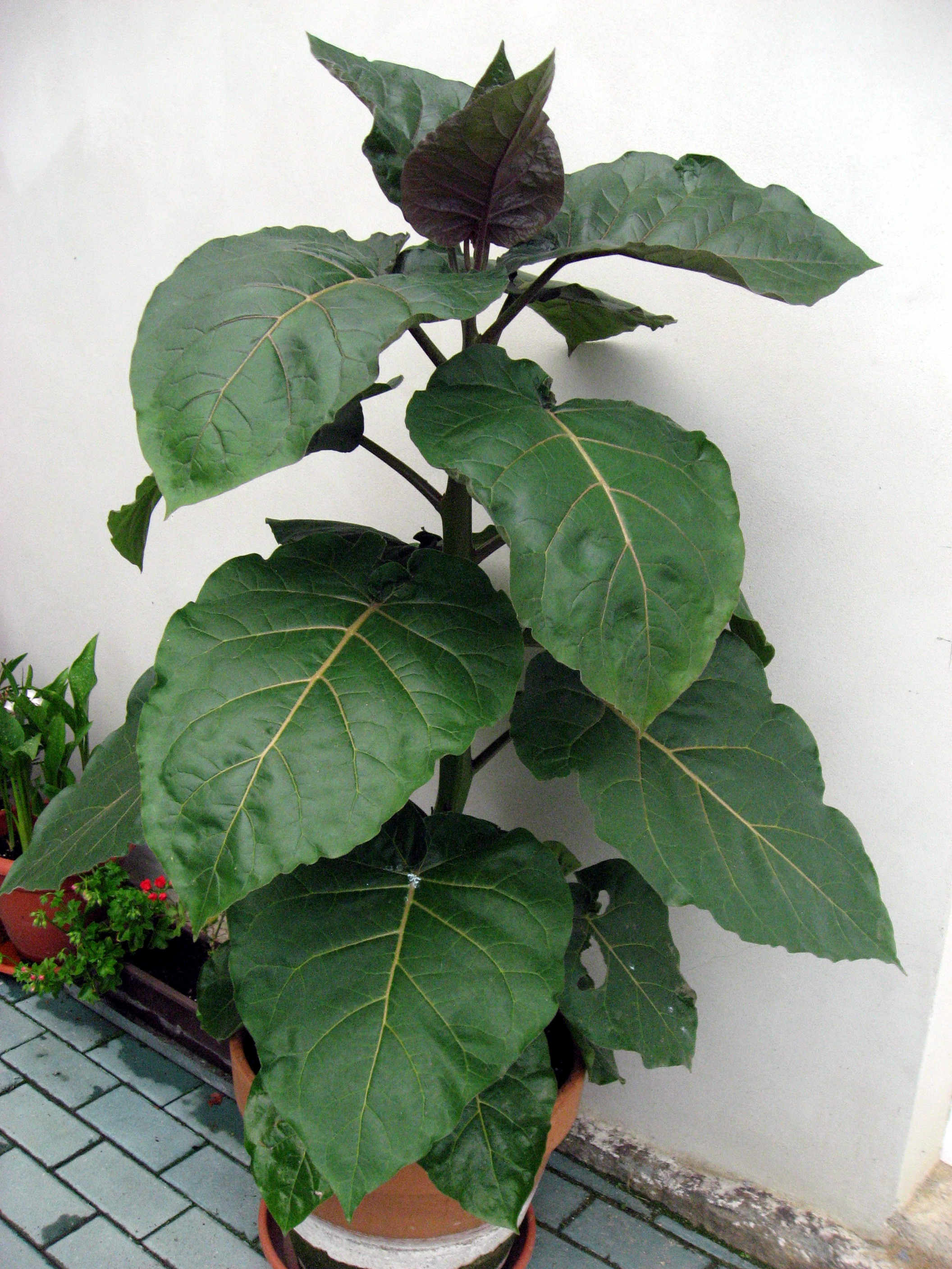 rajčina